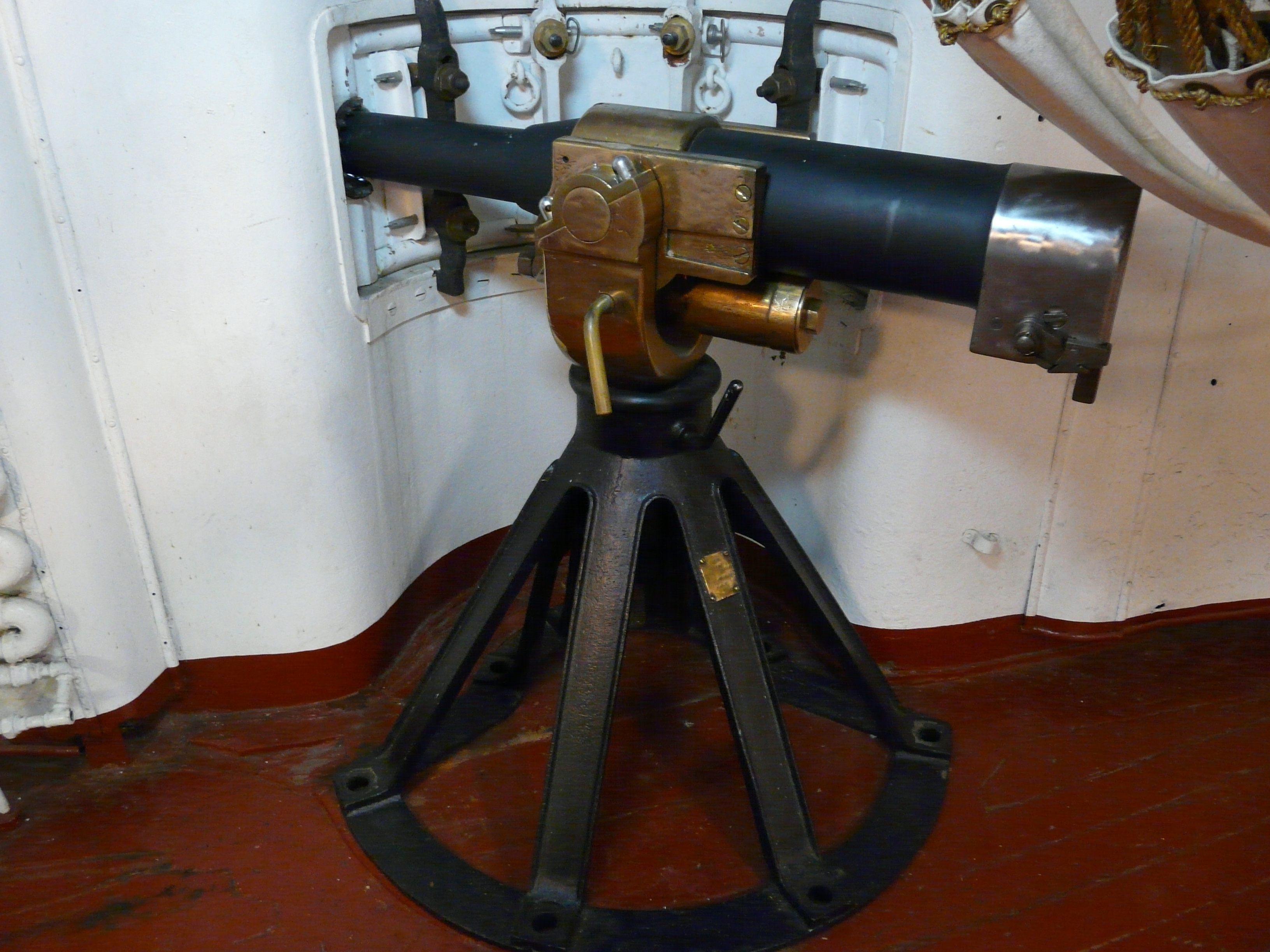 USS Olympia (C-6), Driggs-Schroeder 6-pounder gun